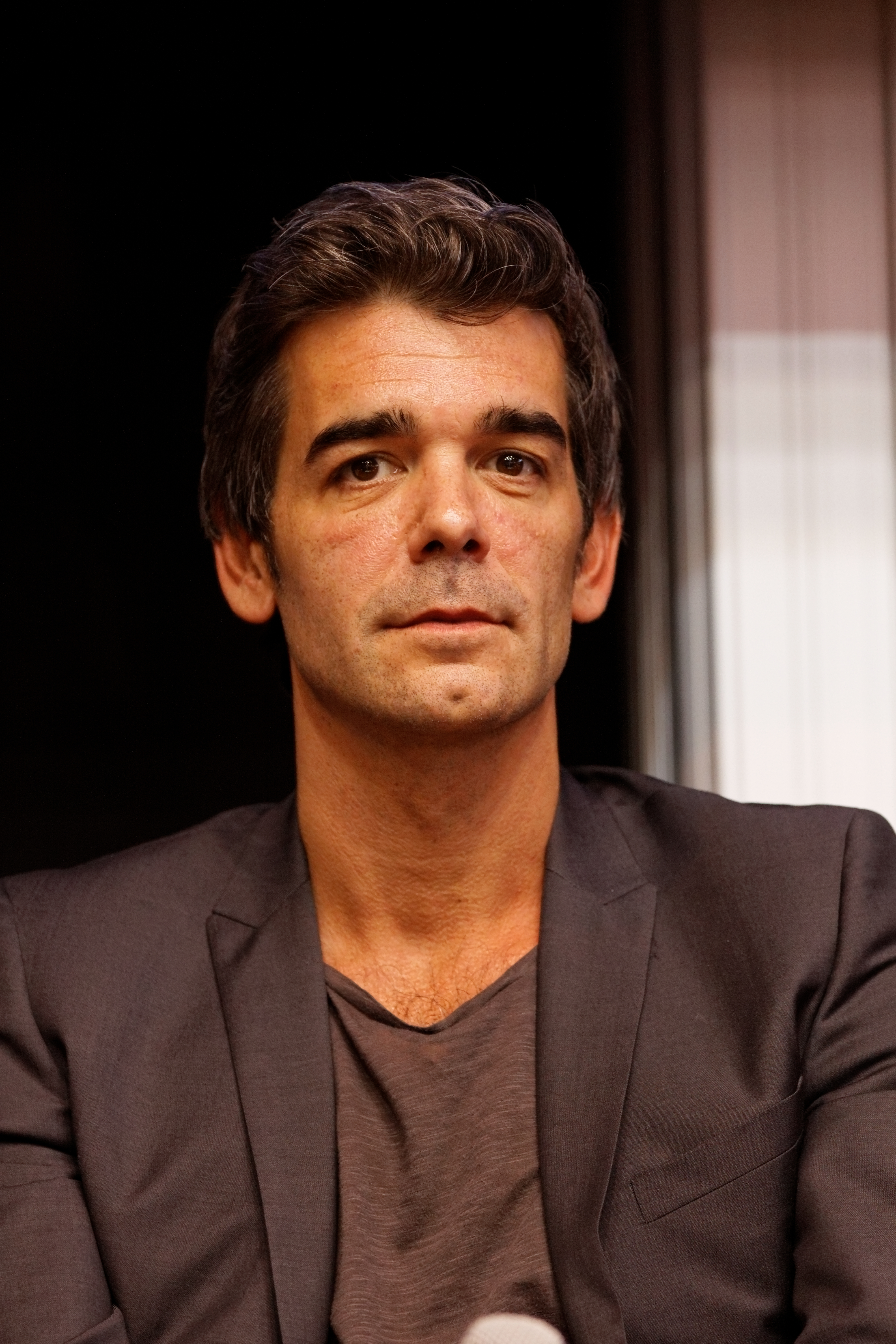 Xavier de Moulins en conférence au salon du livre de Paris 2012.